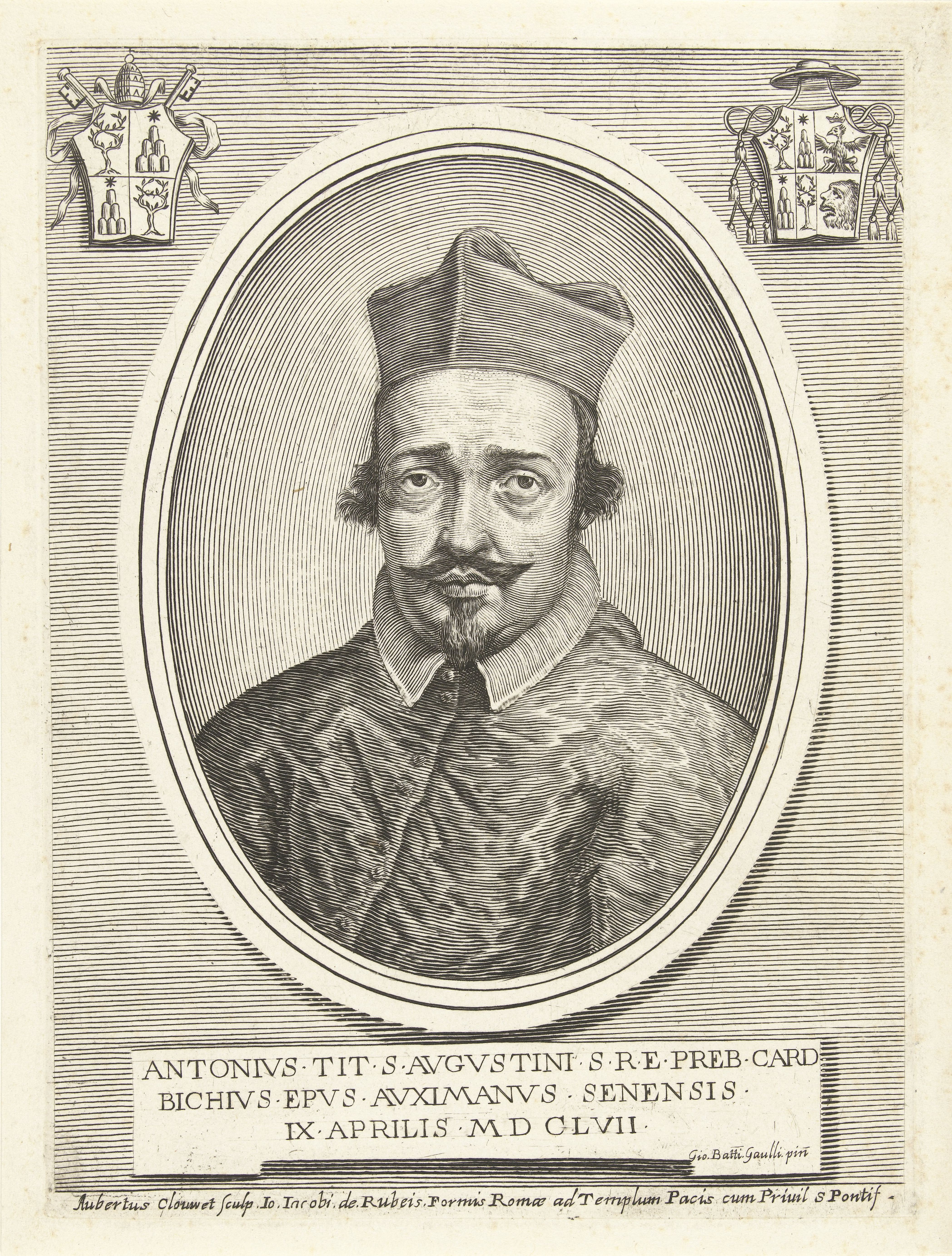 IdentificatieTitel(s): Portret van kardinaal Antonio BichiEffigies Cardinalium nunc viventium (serietitel)Objecttype: prent Objectnummer: RP-P-1909-4371Catalogusreferentie: Singer 7450Hollstein Dutch 8Opschriften / Merken: verzamelaarsmerk, verso midden, gestempeld: Lugt 2228Omschrijving: Portret in ovale lijst van kardinaal Antonio Bichi. Buste naar links. Bovenaan links het wapen van paus Alexander VII, bovenaan rechts het wapen van kardinaal Antonio Bichi. De prent heeft een Latijns onderschrift met gegevens over de geportretteerde.VervaardigingVervaardiger: prentmaker: Albertus Clouwet (vermeld op object)naar schilderij van: Giovanni Battista Gaulli (vermeld op object)uitgever: Giovanni Giacomo de'Rossi (vermeld op object)Plaats vervaardiging: RomeDatering: 1657 - 1679Fysieke kenmerken: gravureMateriaal: papier Techniek: graveren (drukprocedé)Afmetingen: plaatrand: h 195 mm × b 145 mmToelichtingdeel van een serie met als titel "Effigies Cardinalium nunc viventum". De serie bestaat uit portretten van kardinalen.OnderwerpWie: Antonio BichiVerwerving en rechtenVerwerving: aankoop 1905Copyright: Publiek domein